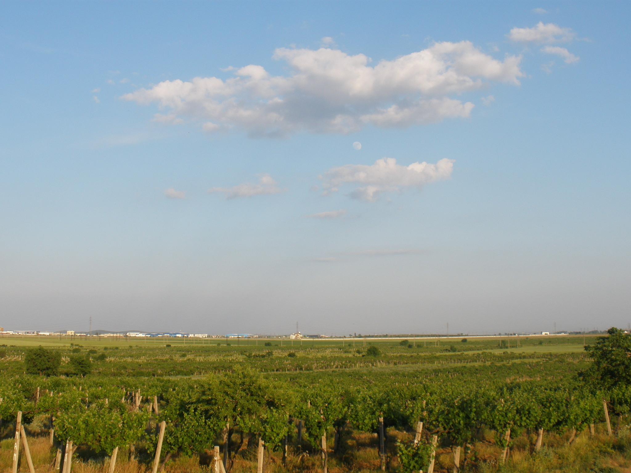 На преден план се виждат лозови насаждения в околността на Подбалканския първокласен път и кв. Речица, а в далечината - част от индустриалната зона на град Сливен.